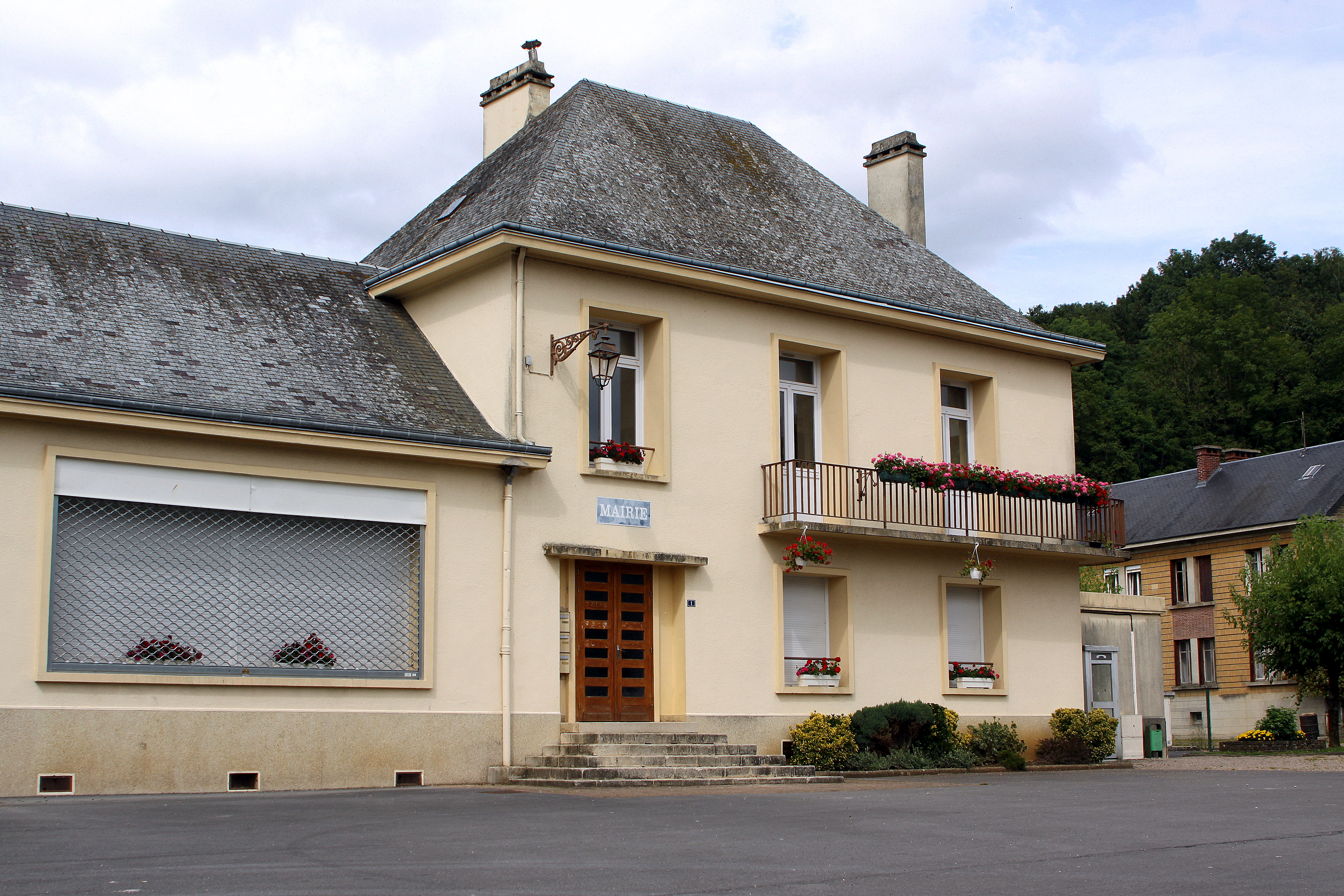 D'Märei vun Daigny